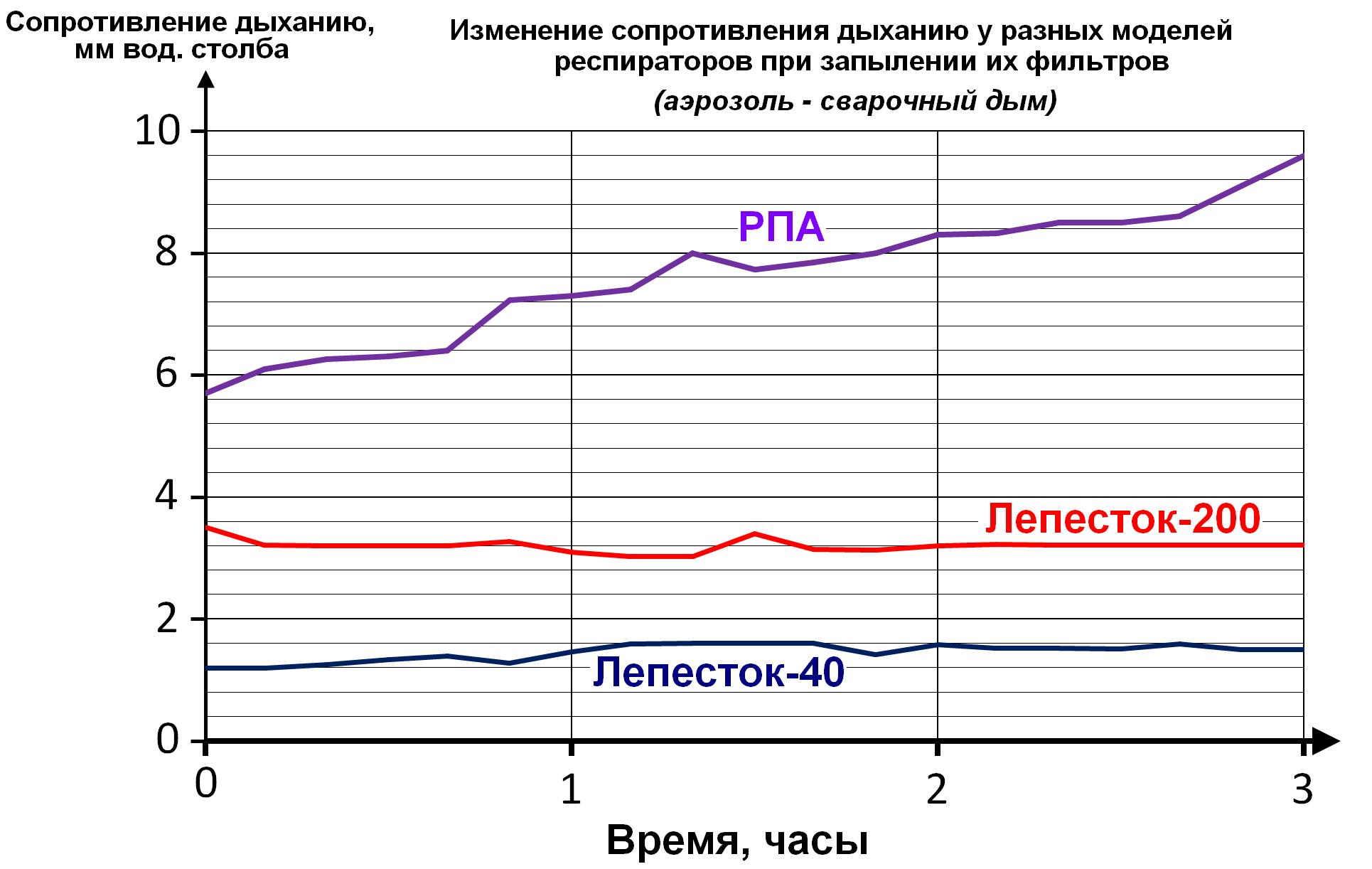 На диаграмме, построенной на основе рис. 19 из Трумпайц ЯИ, Каминский СЛ, Афанвсьева ЕН, "Эффективность респираторов для защиты от силикозоопасных пылей", Научные работы институтов охраны труда ВЦСПС, том 40 1966г с.79-93, показано измерение сопротивления дыханию при запылении фильтра аэрозолем сварочного дыма в течение 3 часов. Видно, что у респиратора Лепесток-40 сопротивление практически не меняется, у респиратора Лепесток-200 оно уменьшается на 8-9%, а у РПА (и у других моделей полумасок - здесь не показаны) значительно возрастает - как и у всех современных респираторов.